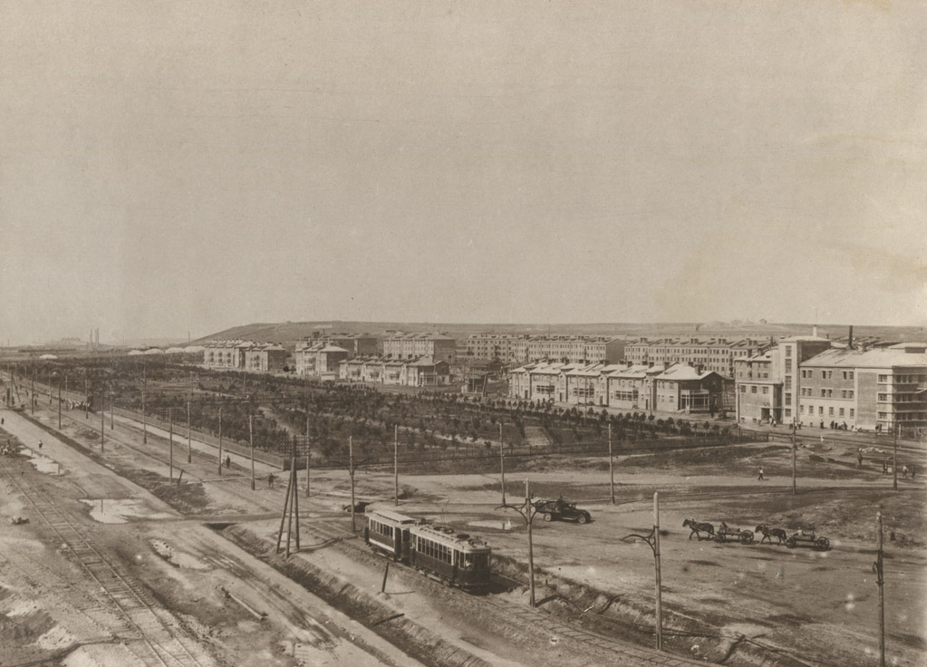 Конечная остановка трамвая возле завода СТЗ 1930-е годы. Крайнее правое здание - сохранившееся здание по современному адресу Проспект Ленина 215 - в 1930-е годы здание музыкальной школы